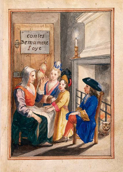 Cette copie manuscrite anonyme des contes date de 1695, soit deux ans avant leur publication. Cinq des huit contes en prose y figurent. Orné d'un frontispice, d'un cartouche et de cinq vignettes, l'ensemble est relié aux armes d'élisabeth Charlotte d'Orléans, nièce de Louis XIV et dédicataire du livre. Quelques corrections et commentaires d'une seconde main figurent sur ce texte, peut être de Perrault lui-même. Copie manuscrite des Contes de ma Mère l'Oye de Charles Perrault, 1695. (19 x 13 cm) New York, The Pierpont Morgan Library (MA 1505) Voir aussi : La Barbe bleue La belle au bois dormant Le Maître Chat Le petit chaperon rouge Les Fées